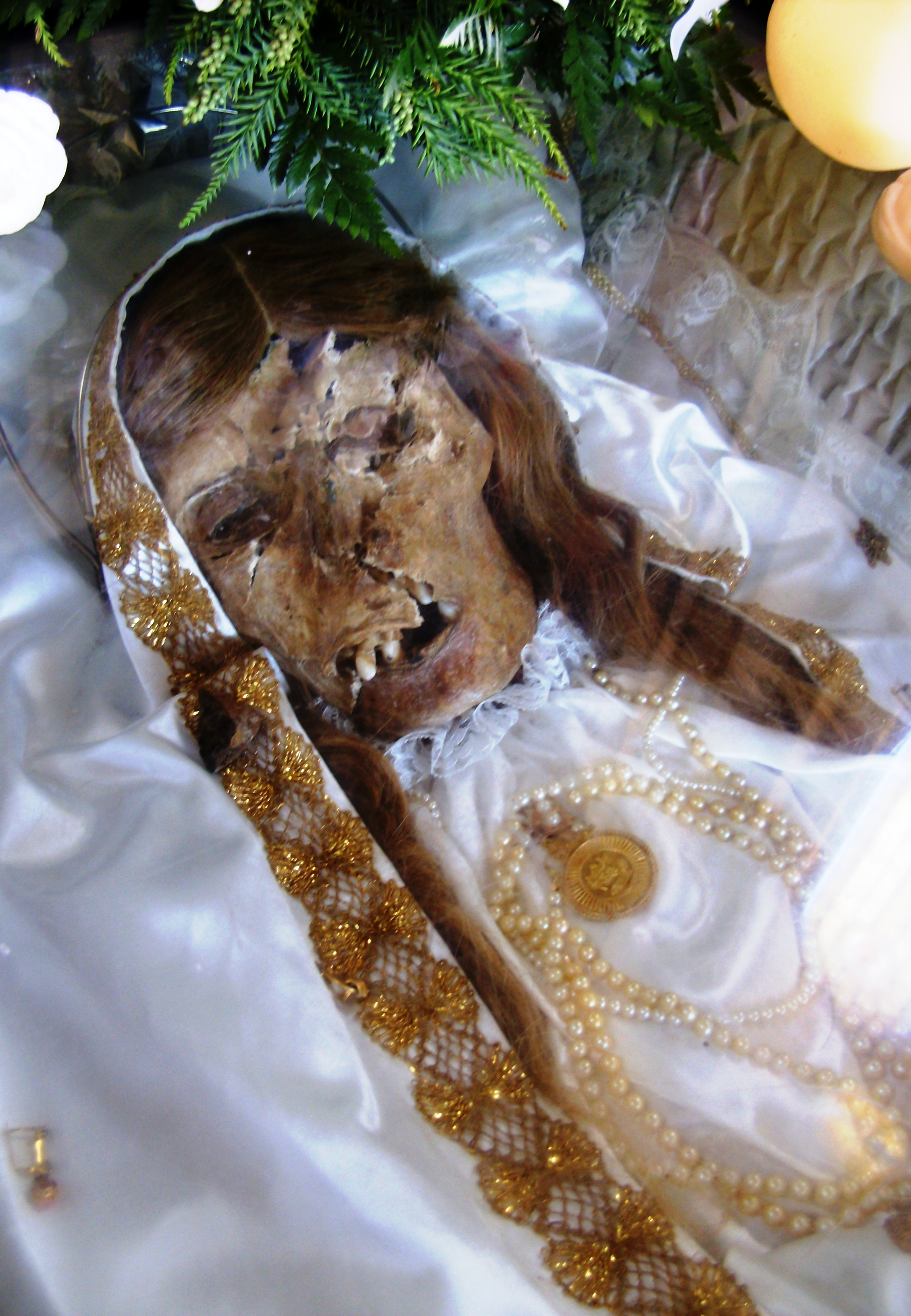 Santo em carne de D. Maria Adelaide de Sam José e Sousa, também referida como Santa Maria Adelaide e Santinha de Arcozelo, Arcozelo, Vila Nova de Gaia, distrito do Porto, Portugal: detalhe.